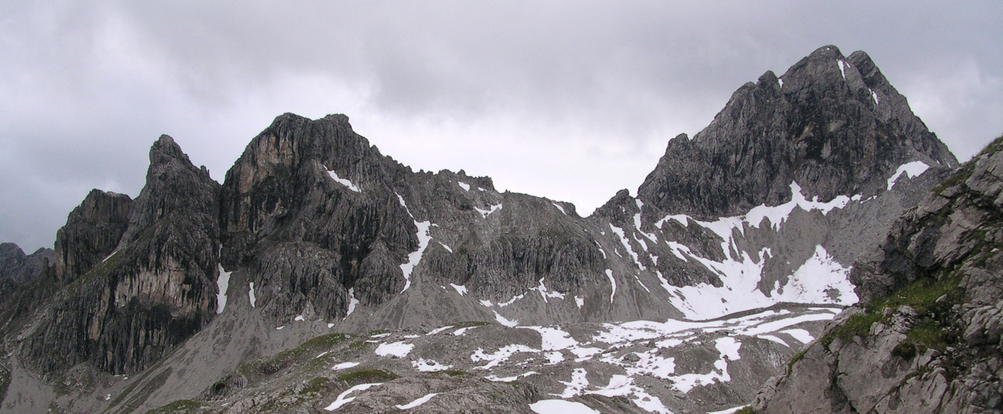 Hermannskarturm (2430 m), Hermannskarspitze (2472 m) und Marchspitze (2609 m).